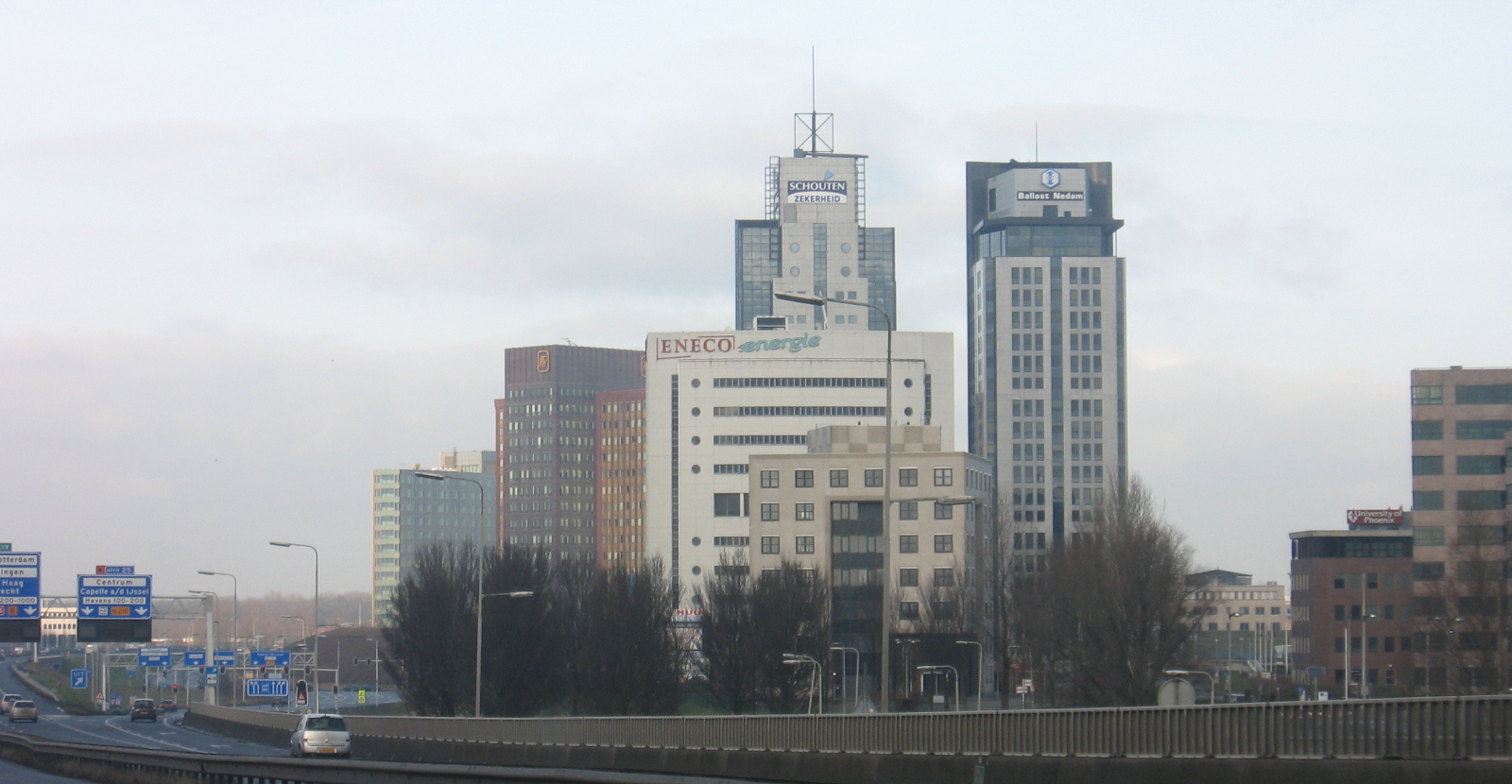 Rivium, Capelle ad IJssel